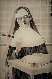 Sœur Marie Morin 1649-1730, dessin